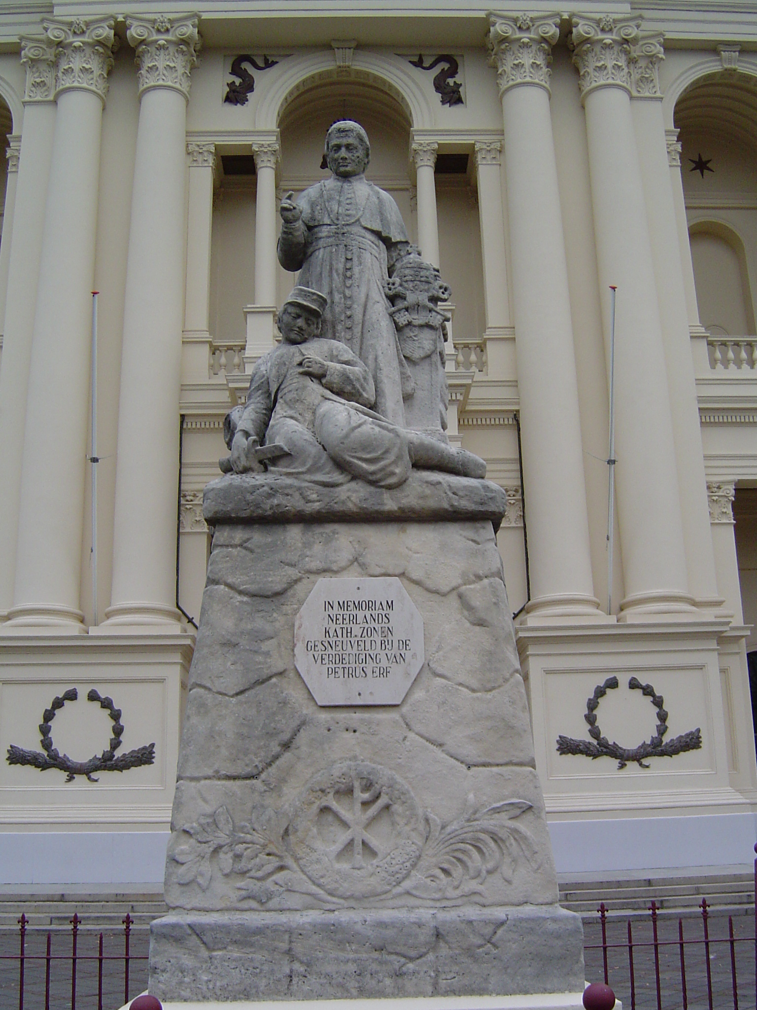 Oudenbosch Basilica, Holland